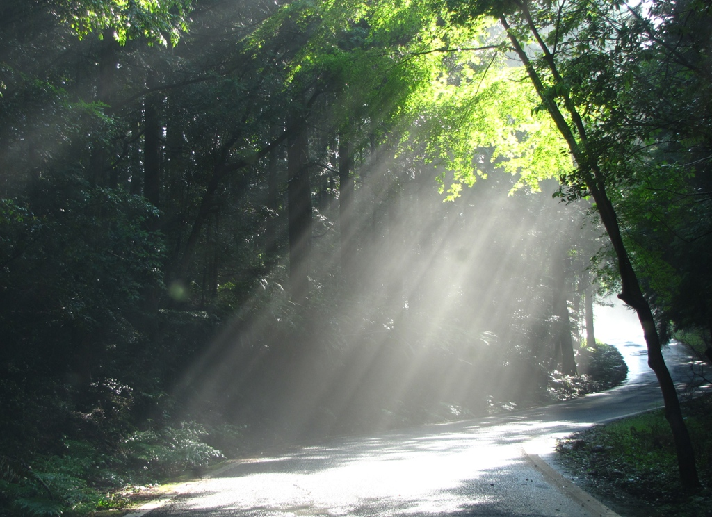 木漏れ日。徳島県鶴林寺付近。